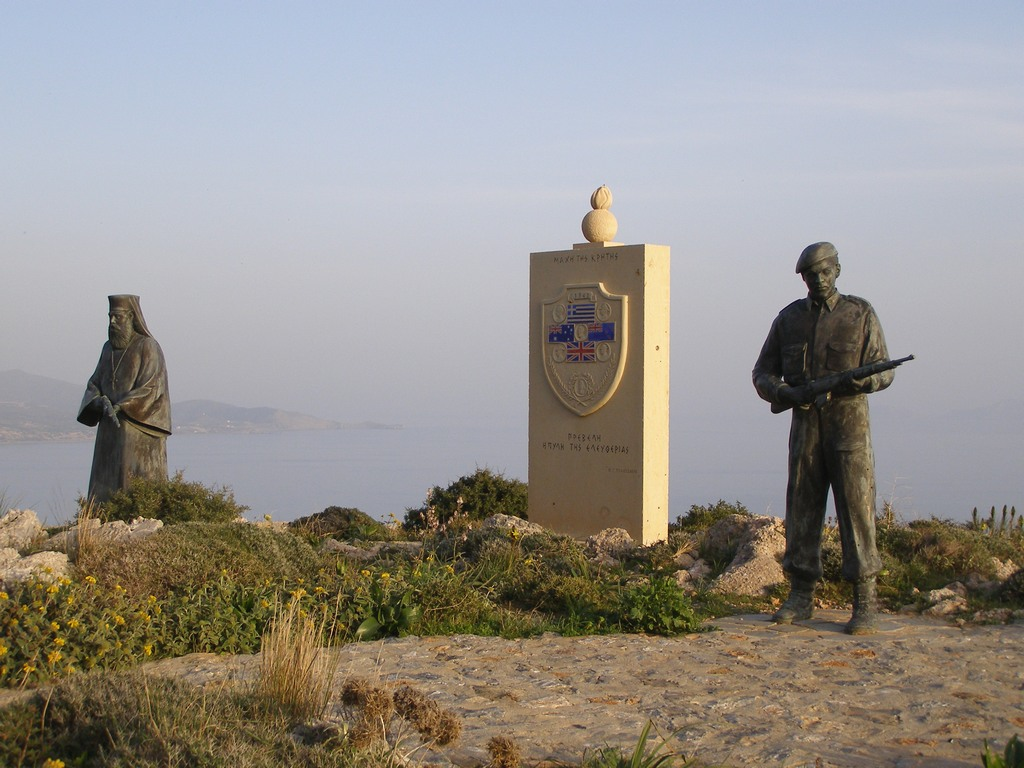 Denkmal für den Widerstand der Mönche des Klosters Preveli mit Hilfe der Briten in Preveli / Kreta.